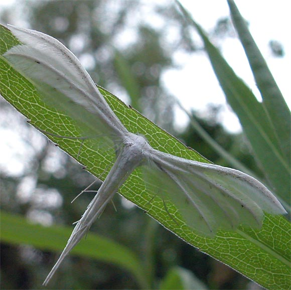 Schlehenfedergeistchen, Pterophorus pentadactylus (Linnaeus, 1758)